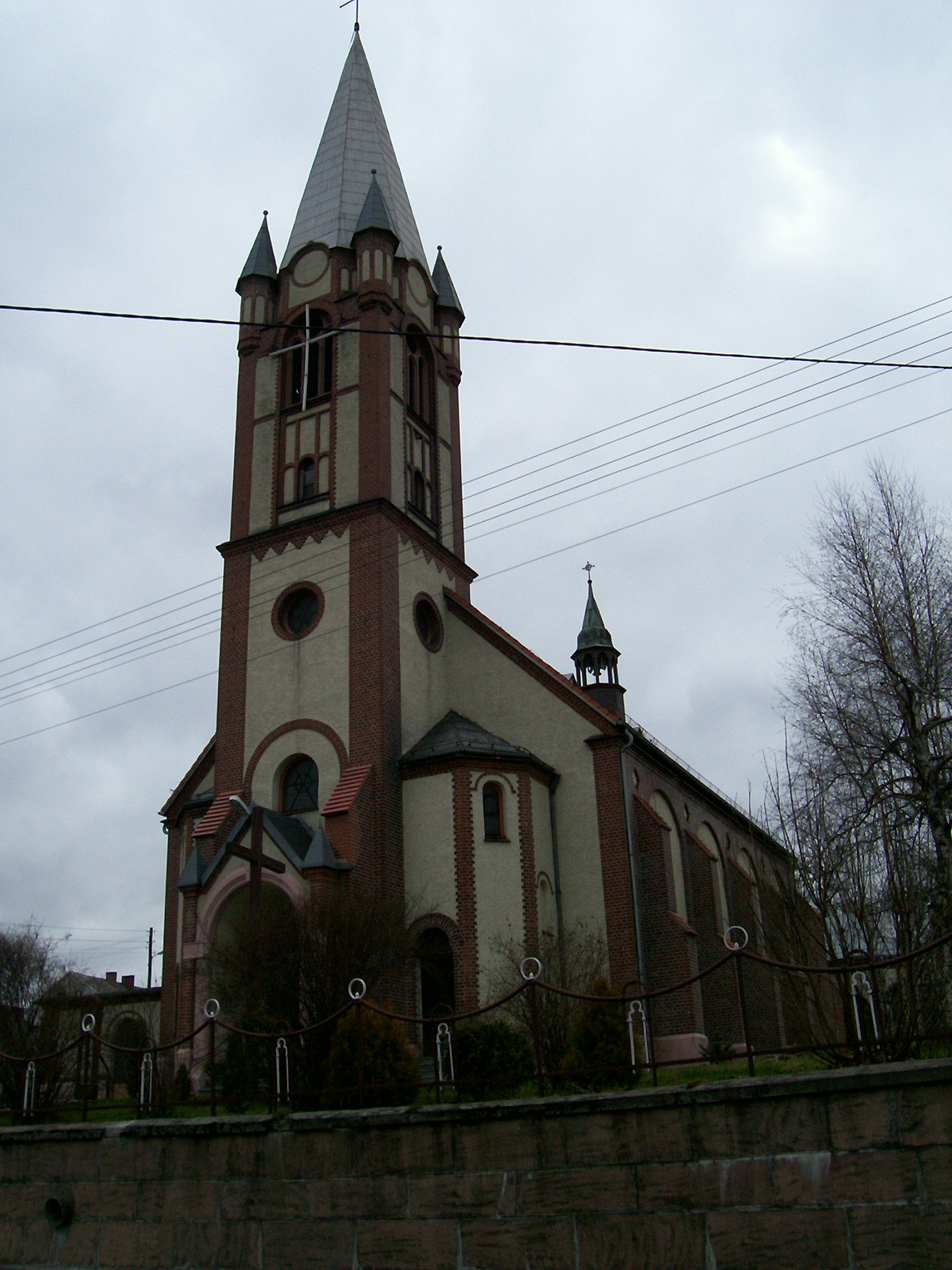 Kościół pw. Najświętszej Marii Panny w Krowiarkach